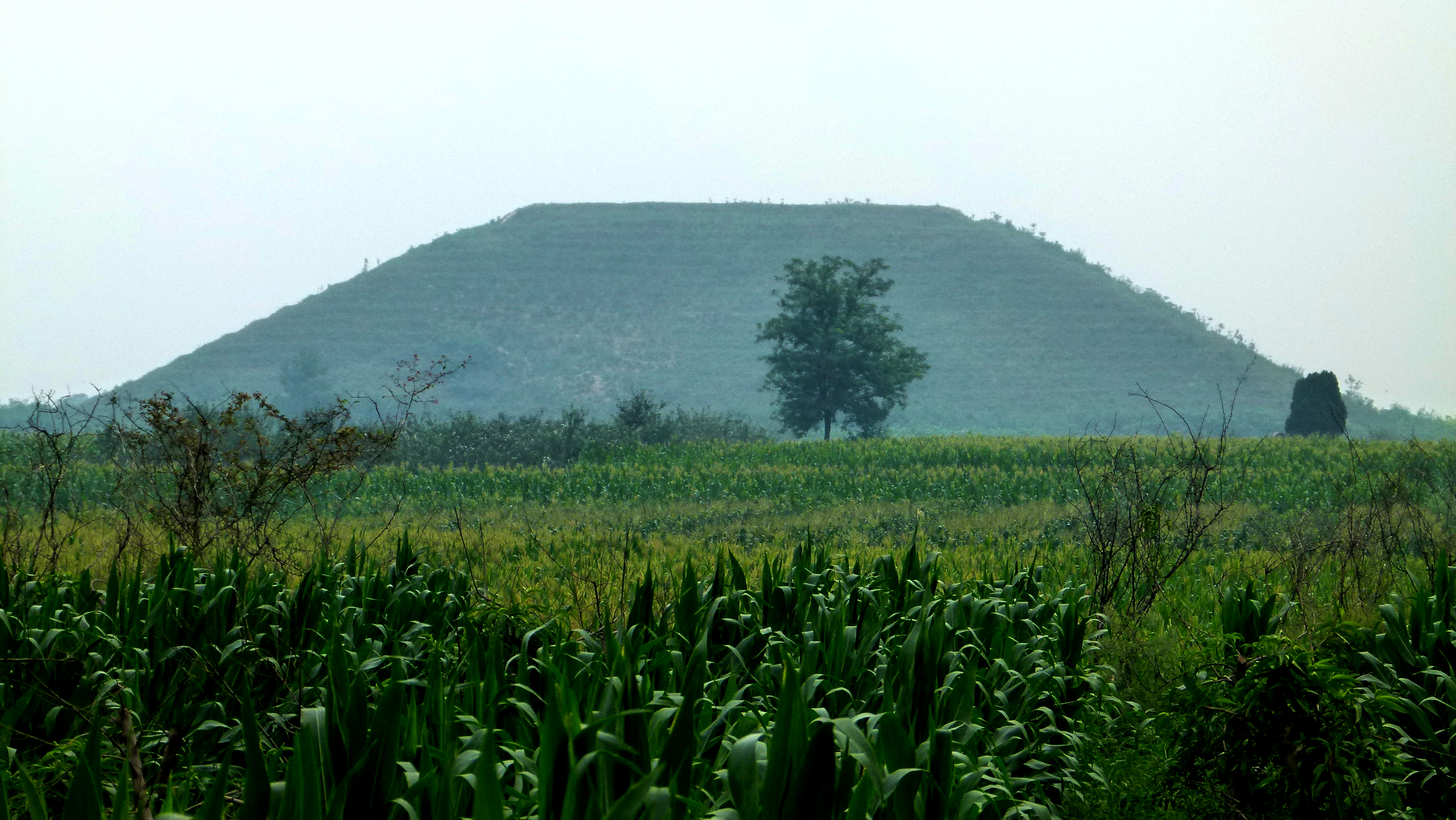 Pingling - Grab des Kaisers